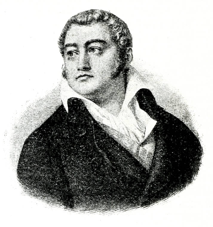 Данное изображение было также использовано для иллюстрирования статьи «Кадудаль, Жорж» опубликованной в одиннадцатом томе «Военной энциклопедии», который был издан книгоиздательским товариществом Ивана Дмитриевича Сытина в 1913 году в столице Российской империи городе Санкт-Петербурге. Georges Cadoudal, cap de la xuaneria sujet: Georges Cadoudal licence